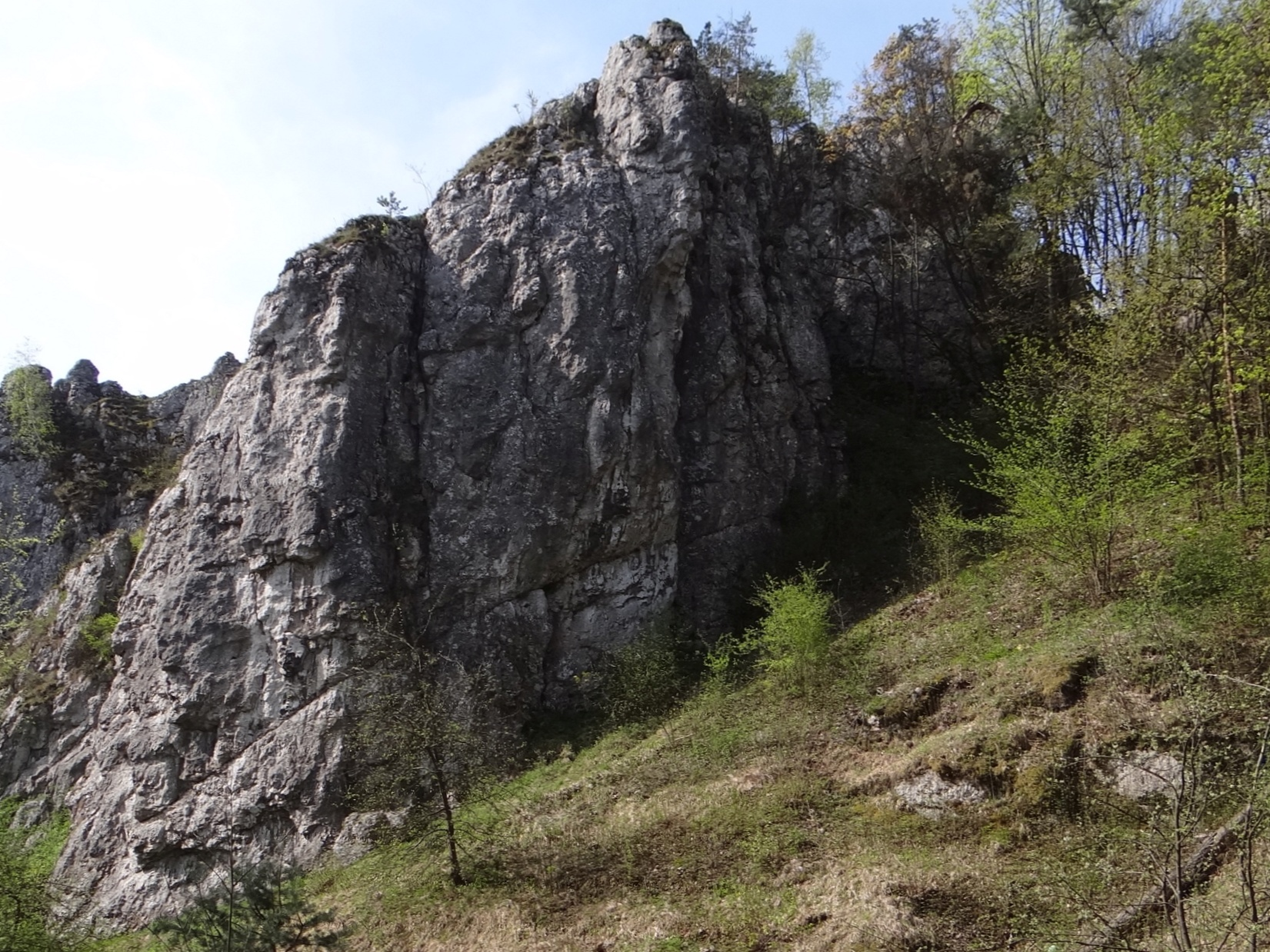 Zamarła Turnia w Dolinie Bolechowickiej